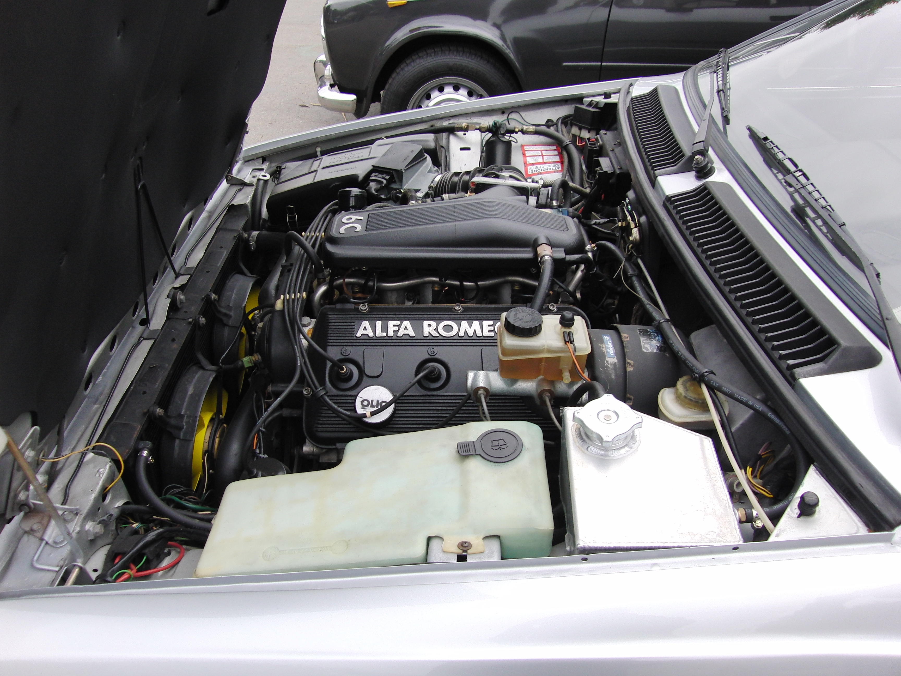 Alfa Romeo V6 engine